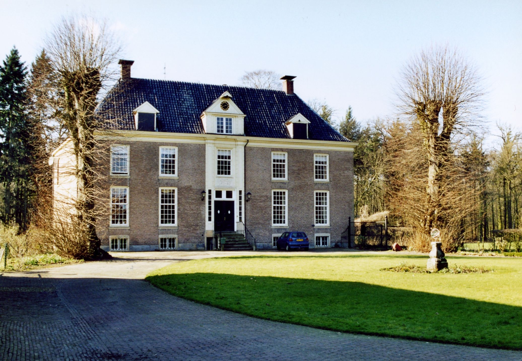 't Wegdam: Overzicht voorgevel havezate (opmerking: Gefotografeerd voor Monumenten In Nederland Overijssel) ..) C. natuurstenen zonnewijzer SOKKEL staande in het midden op het ovale grasperk op het voorplein: vierkante sokkel, XVIII, met vernieuwde ijzeren zonnewijzerbol; balustervorm, onderaan voluutvormig uitzakkend op hoge plint."